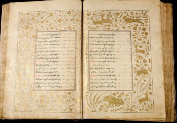 ვეფხისტყაოსნის ბეგთაბეგისეული ნუსხა